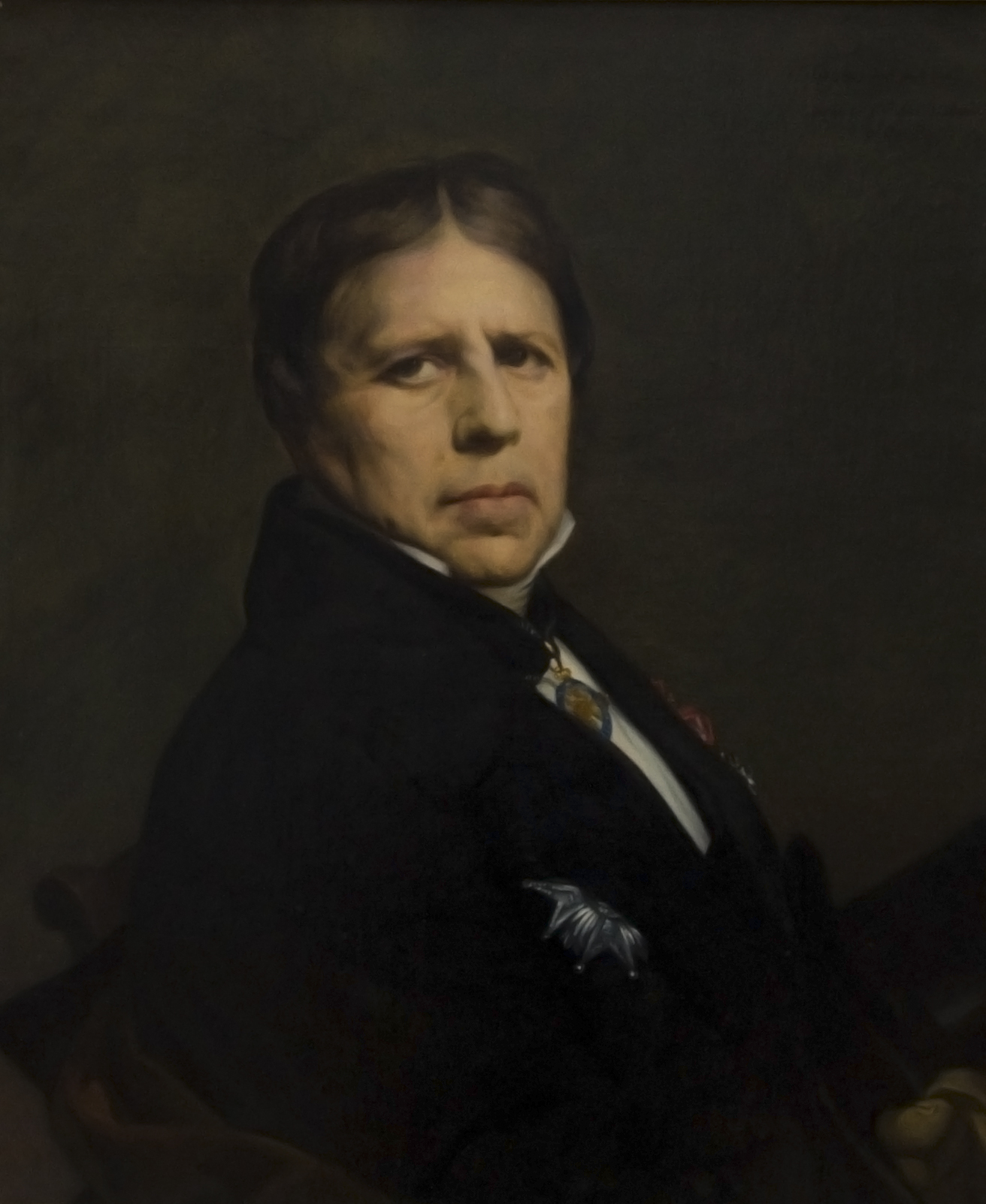 Self-portrait, Jean Auguste Dominique Ingres, 1864